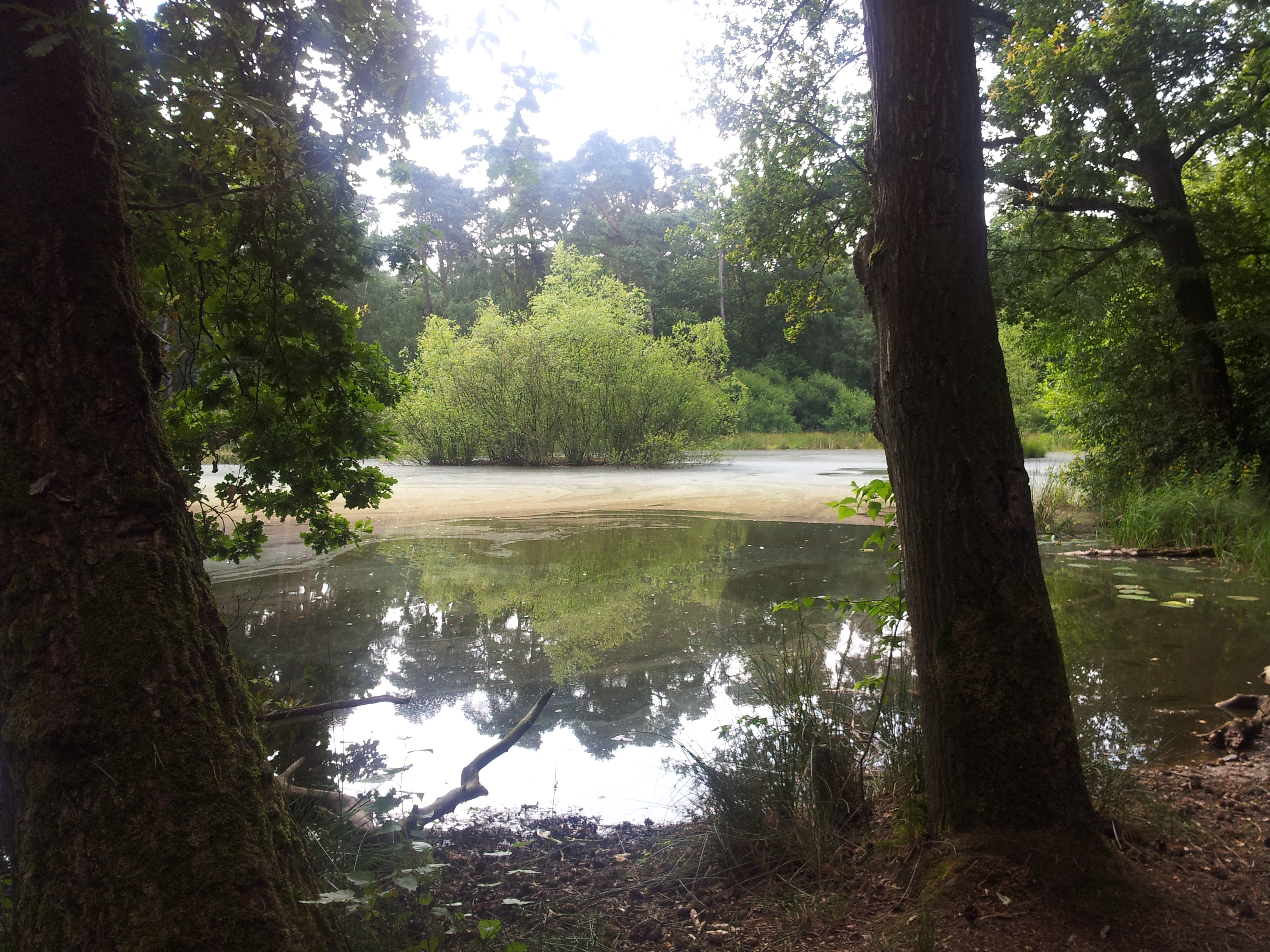 Meeven, Woensdrecht